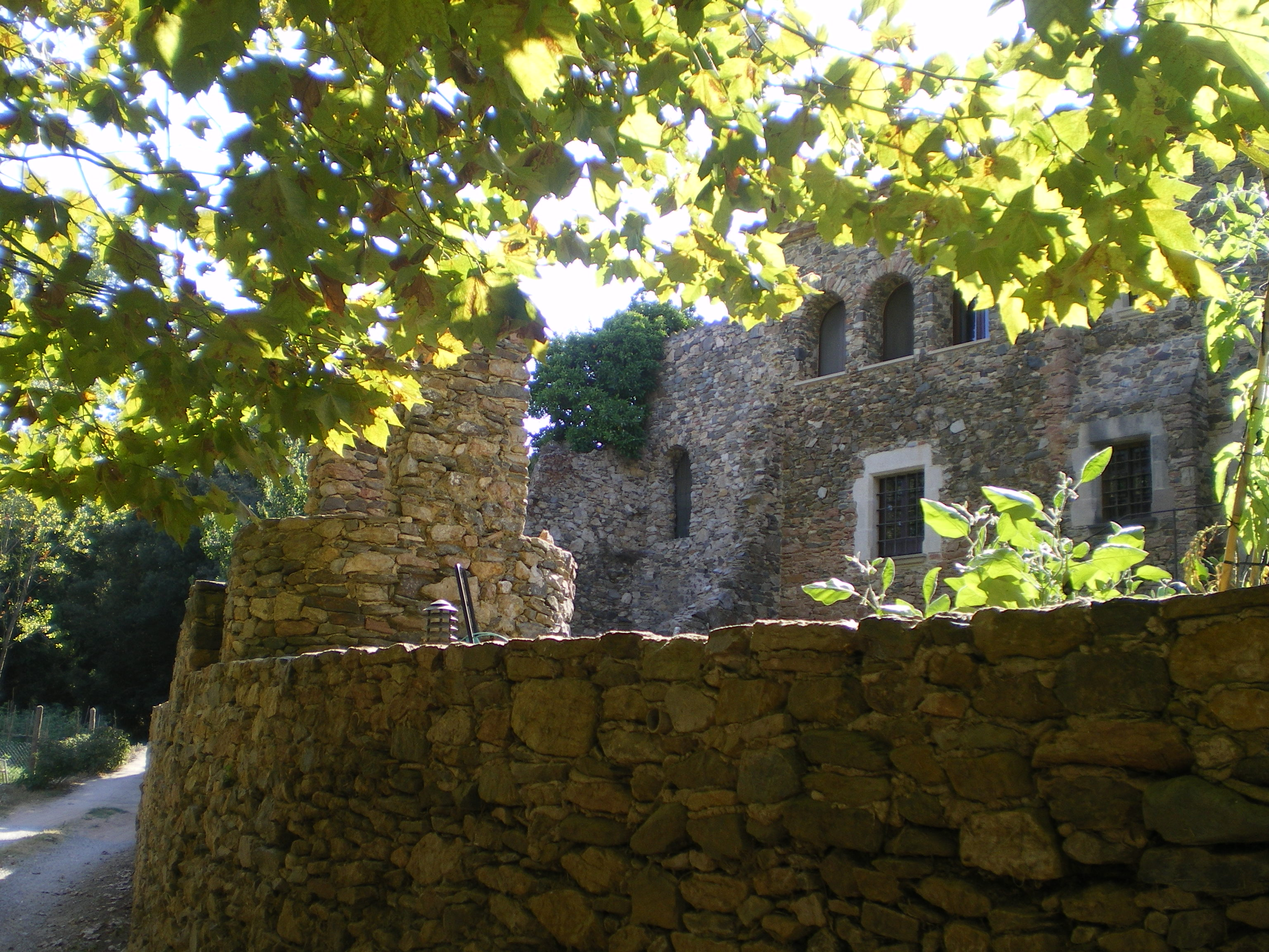 Llofriu